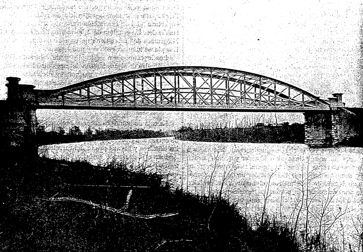 Puente de Prado sobre el río Pisuerga, en Valladolid. España circa 1897